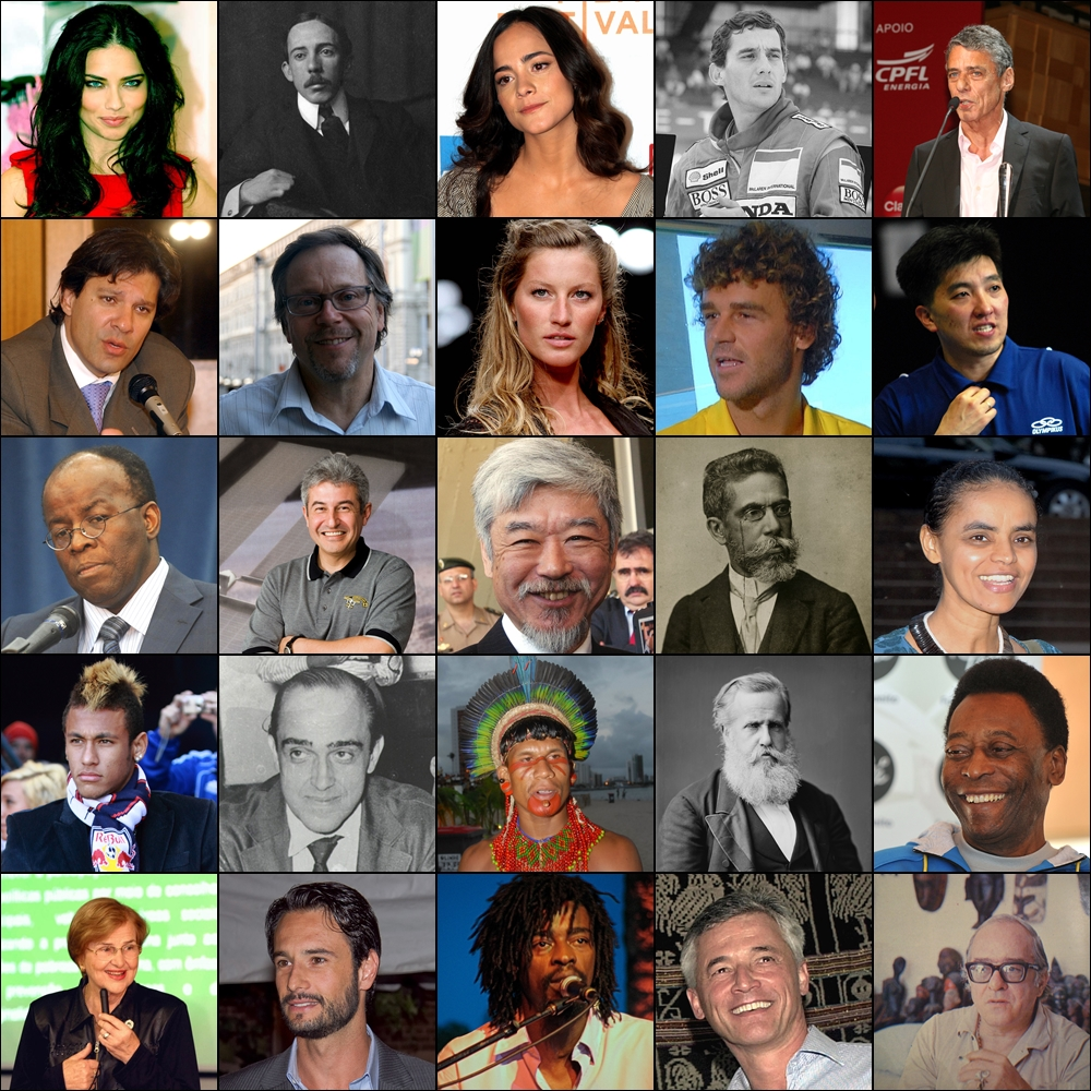 1ª linha: Adriana Lima, Santos Dumont, Alice Braga, Ayrton Senna, Chico Buarque2ª linha: Fernando Haddad, Fernando Meirelles, Gisele Bündchen, Gustavo Kuerten, Hugo Hoyama3ª linha: Joaquim Barbosa, Marcos Pontes, Luiz Gushiken, Machado de Assis, Marina Silva4ª linha: Neymar, Oscar Niemeyer, Índio pataxó, Pedro II, Pelé5ª linha: Zilda Arns, Rodrigo Santoro, Seu Jorge, Sérgio Vieira de Mello, Vinícius de Moraes